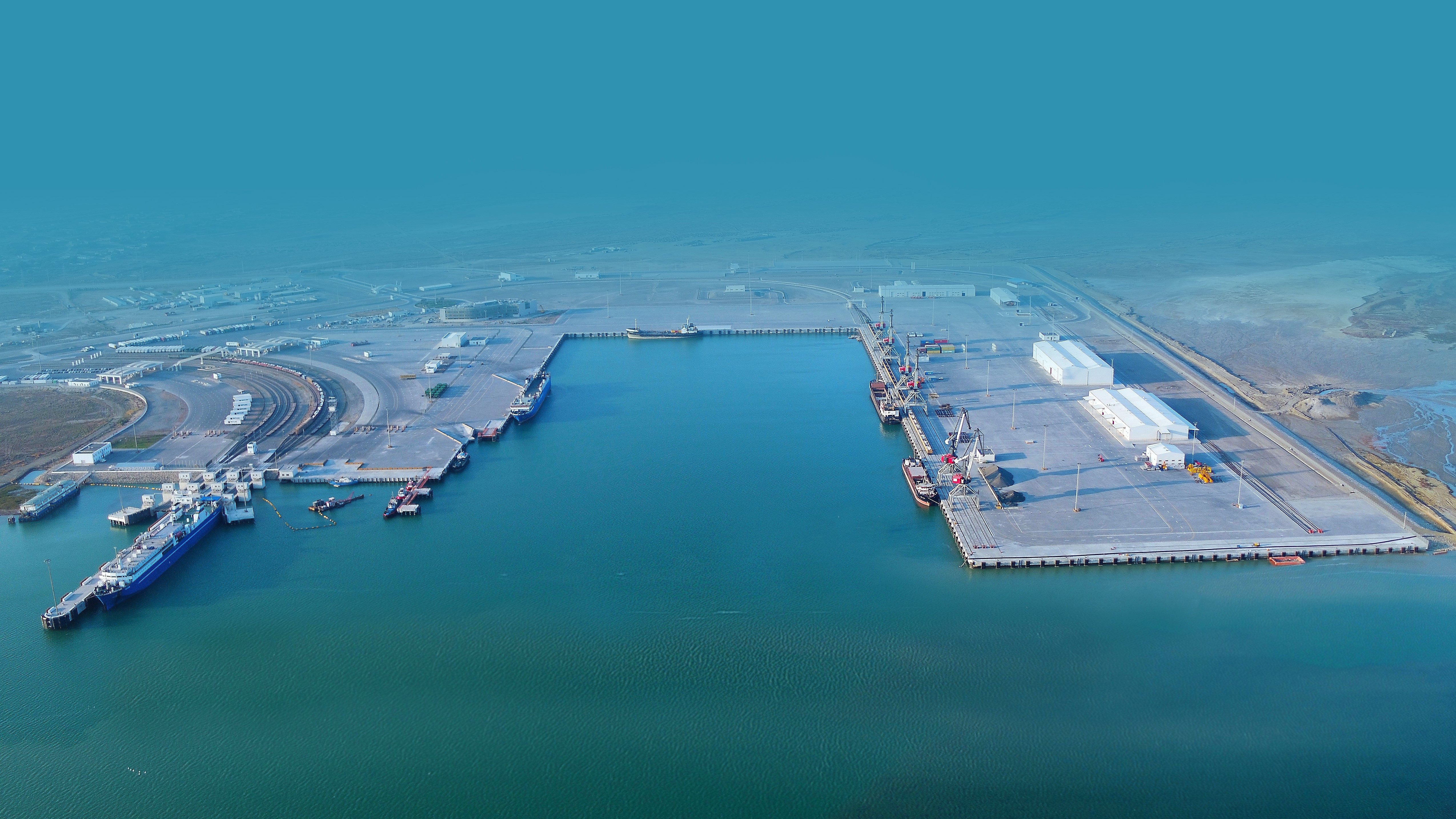 Yeni Bakı Limanı Kompleksi